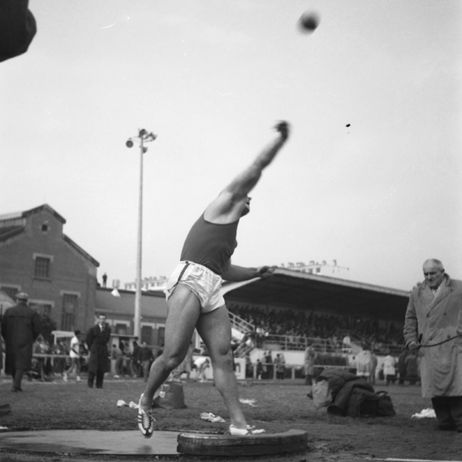 Jean-Claude au lancer du poids lors d'un meeting à Boulogne-Billancourt en juin 1962